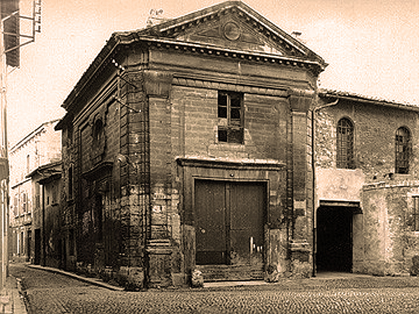 Chapelle des Pénitents violets d'Avignon, oeuvre de Jean Péru